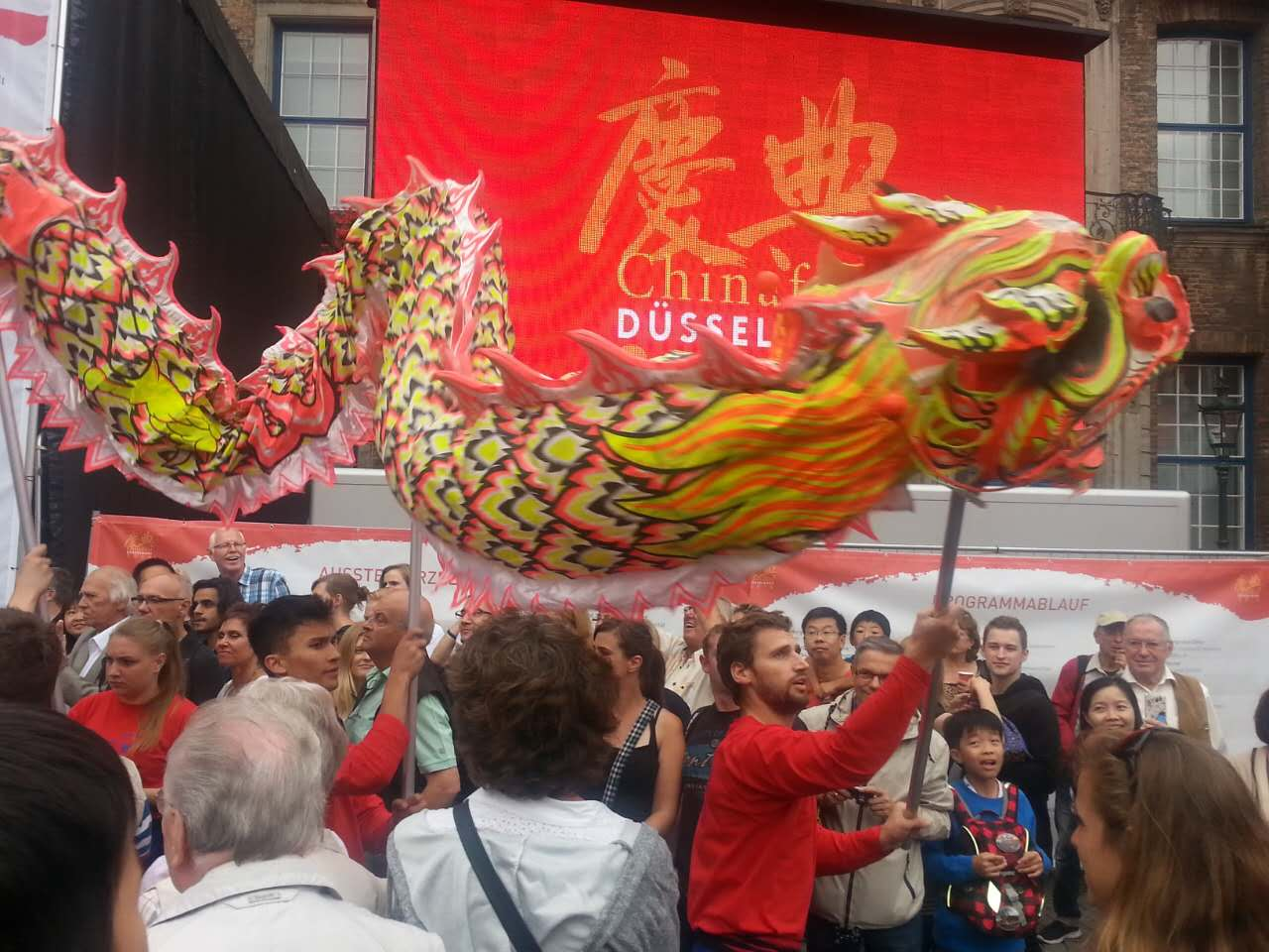 Chinafest 2016: Der Drache tanzt in Düsseldorf